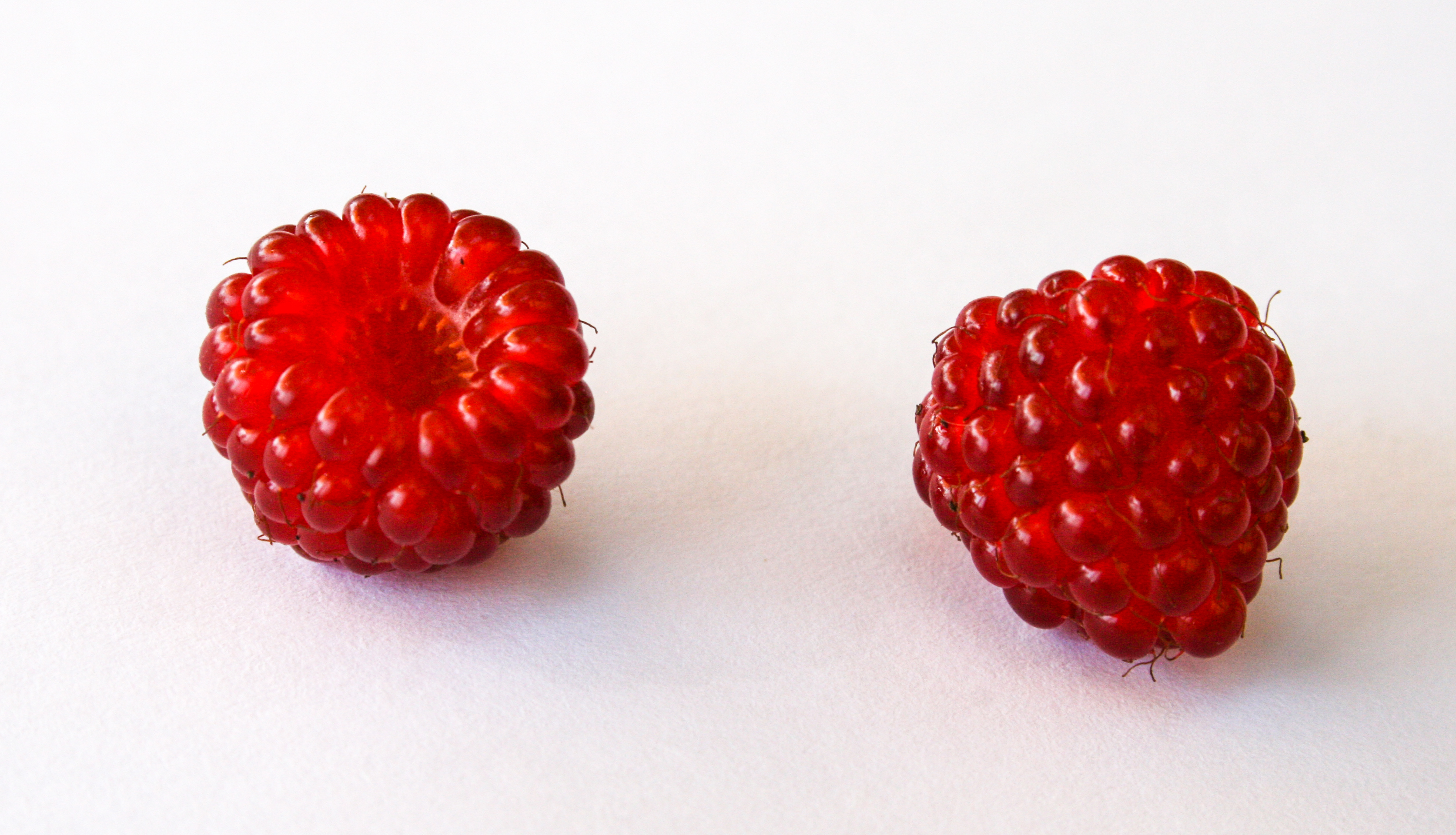 Japanische Weinbeere